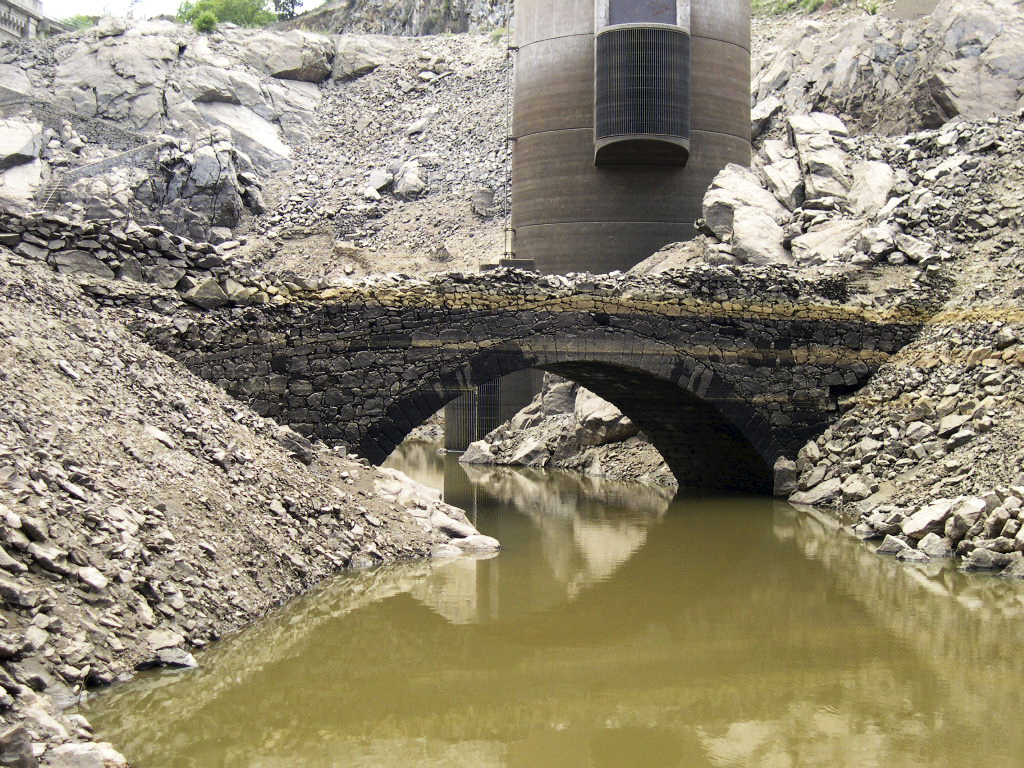 Este es el histórico Puente del Villar, que yace sumergido en el embalse de igual nombre.